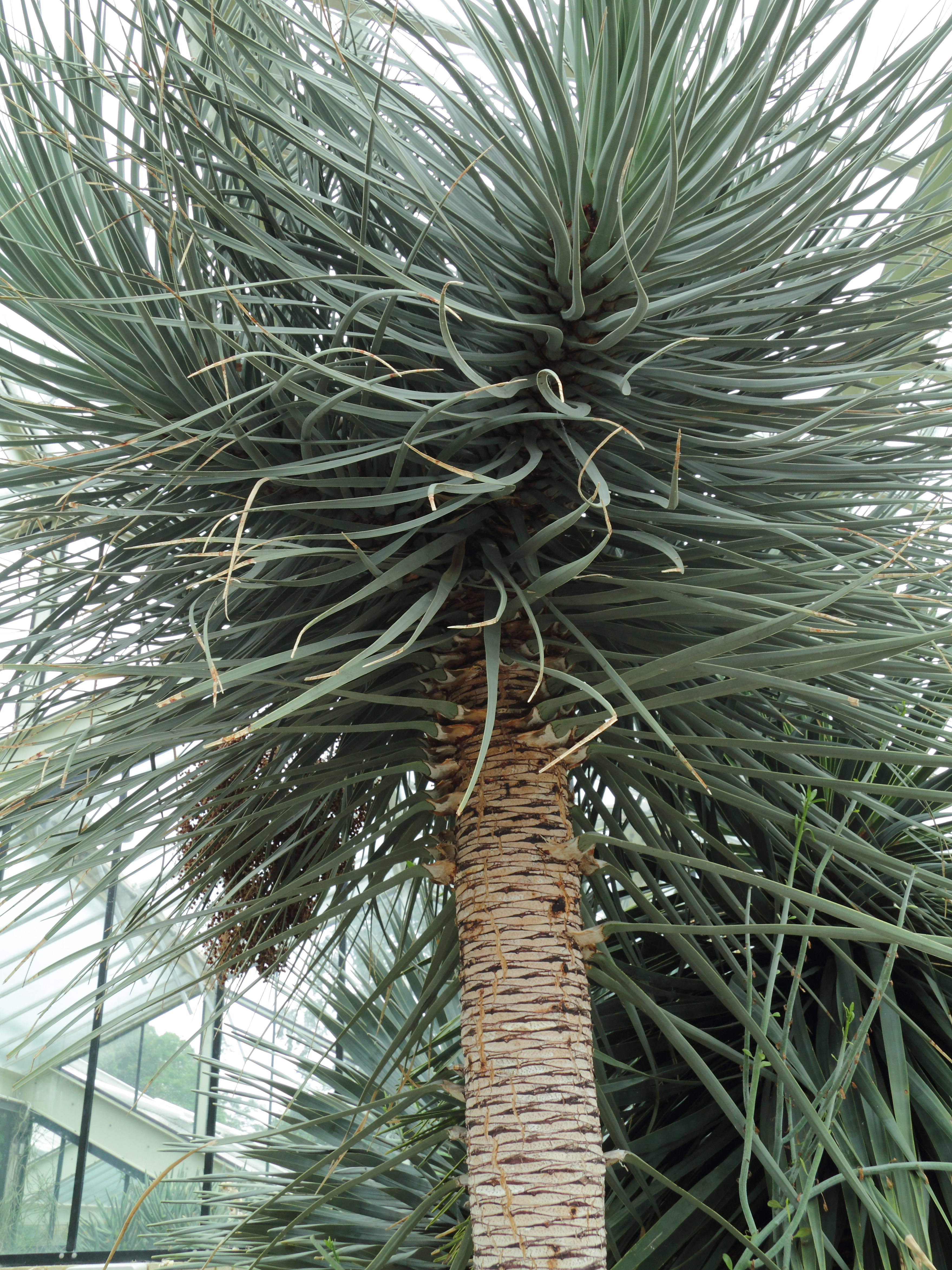 Dracaena schizantha, identifierad med hjälp av befintlig skylt vid Kew Gardens, London.